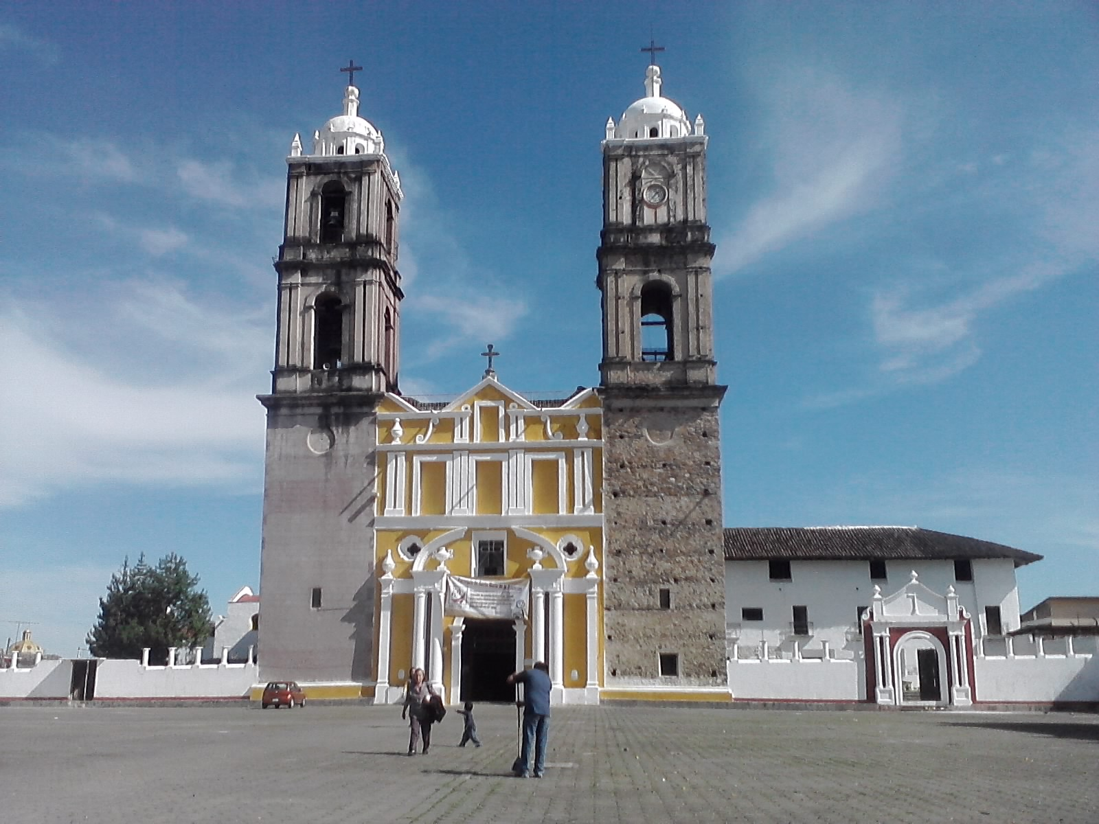 Pueblo magico